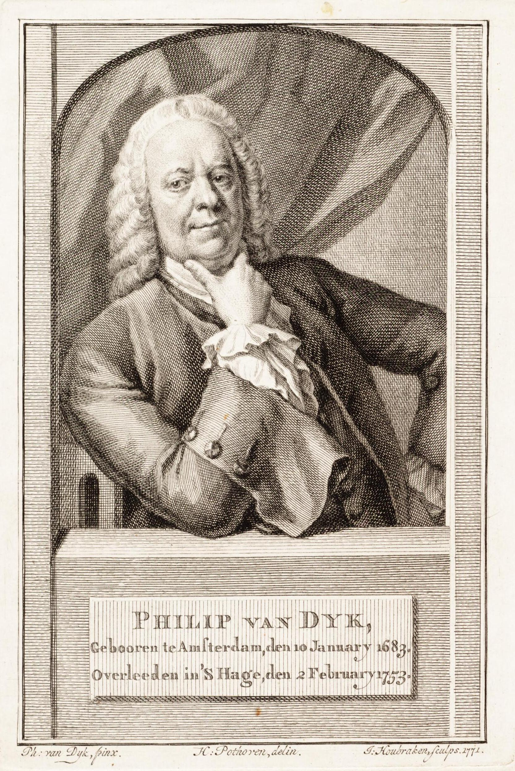 voorstudie van een portret van Philip van Dijk (1683-1753)